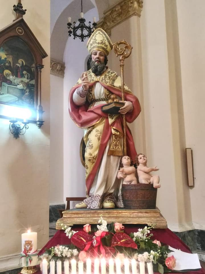 La statua di San Nicola dopo il restauro, custodita all'interno della Concattedrale di Palmi.